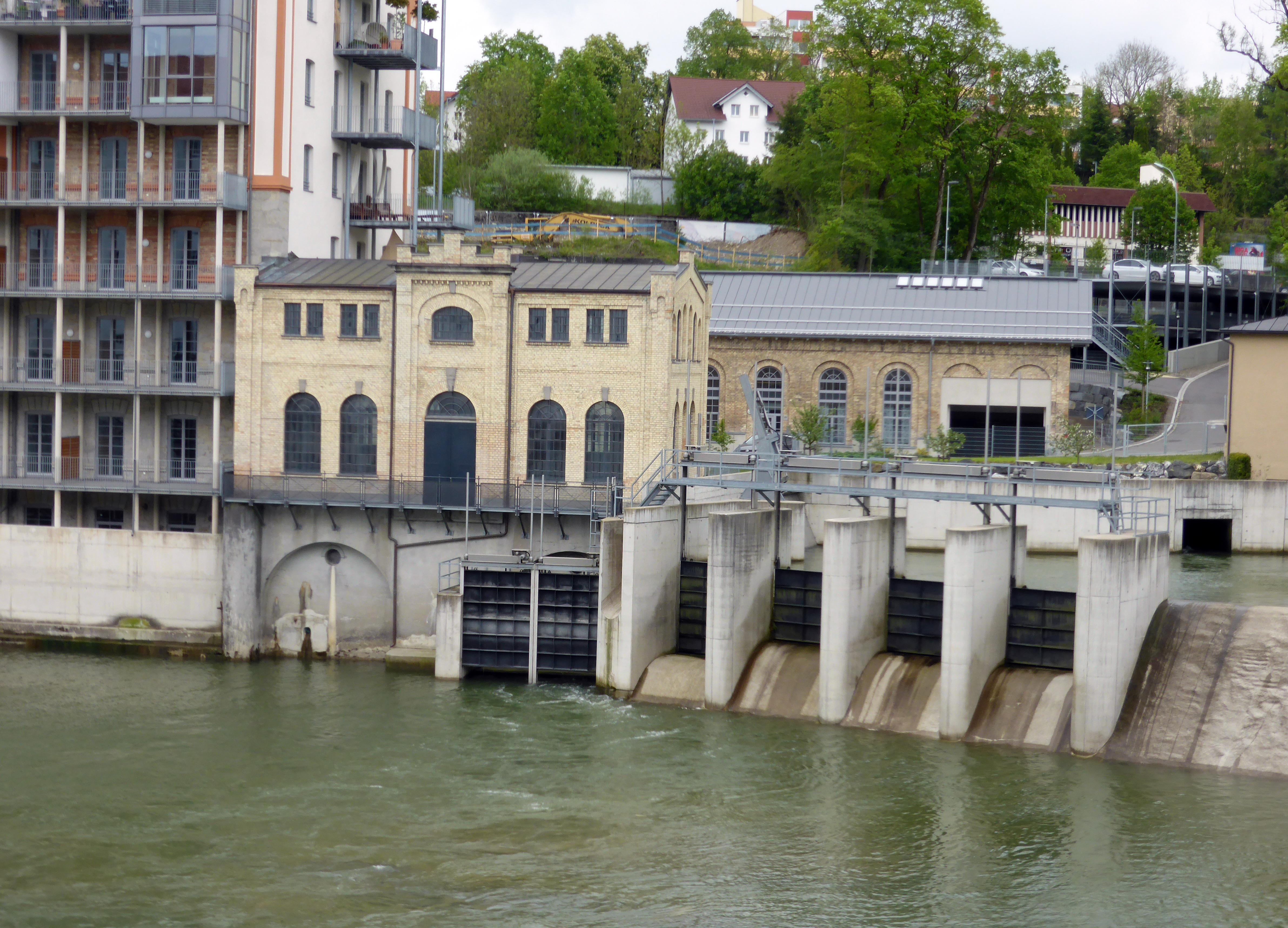 Wikipedia:Süddeutschland-Treffen im Mai 2016 in Kempten im Allgäu. Wasserkraftwerk Füssener Straße an der ehemaligen Weberei und Spinnerei Kempten.